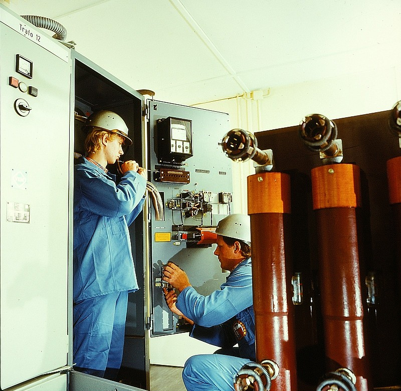 Original image description from the Deutsche Fotothek Elektromonteur